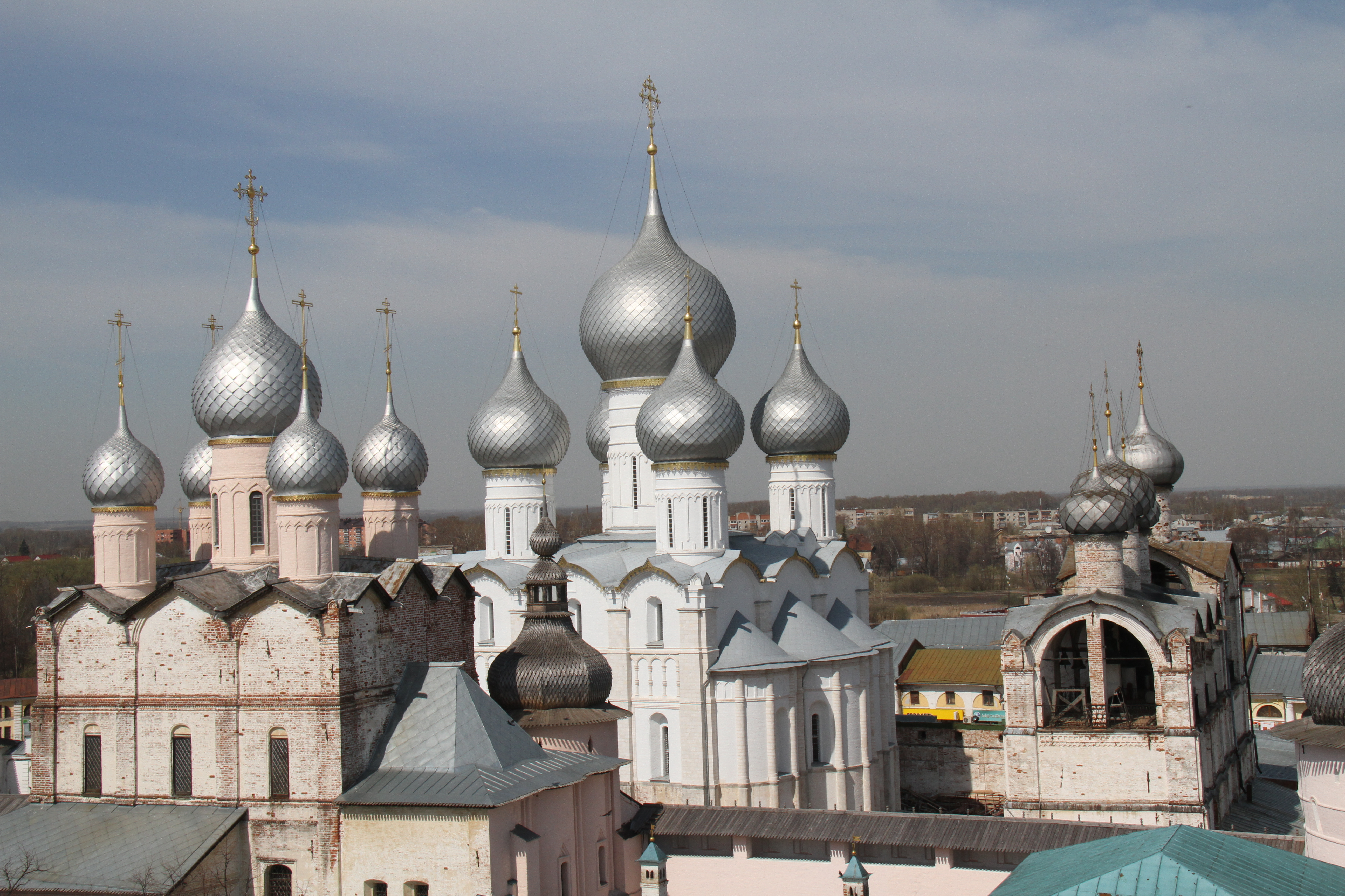 Ярославская область, г. Ростов, Кремль